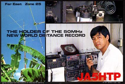 南大東島から「世界最長交信記録」のアンテナTNX JR6SP（左）ja5htp山野常禎氏